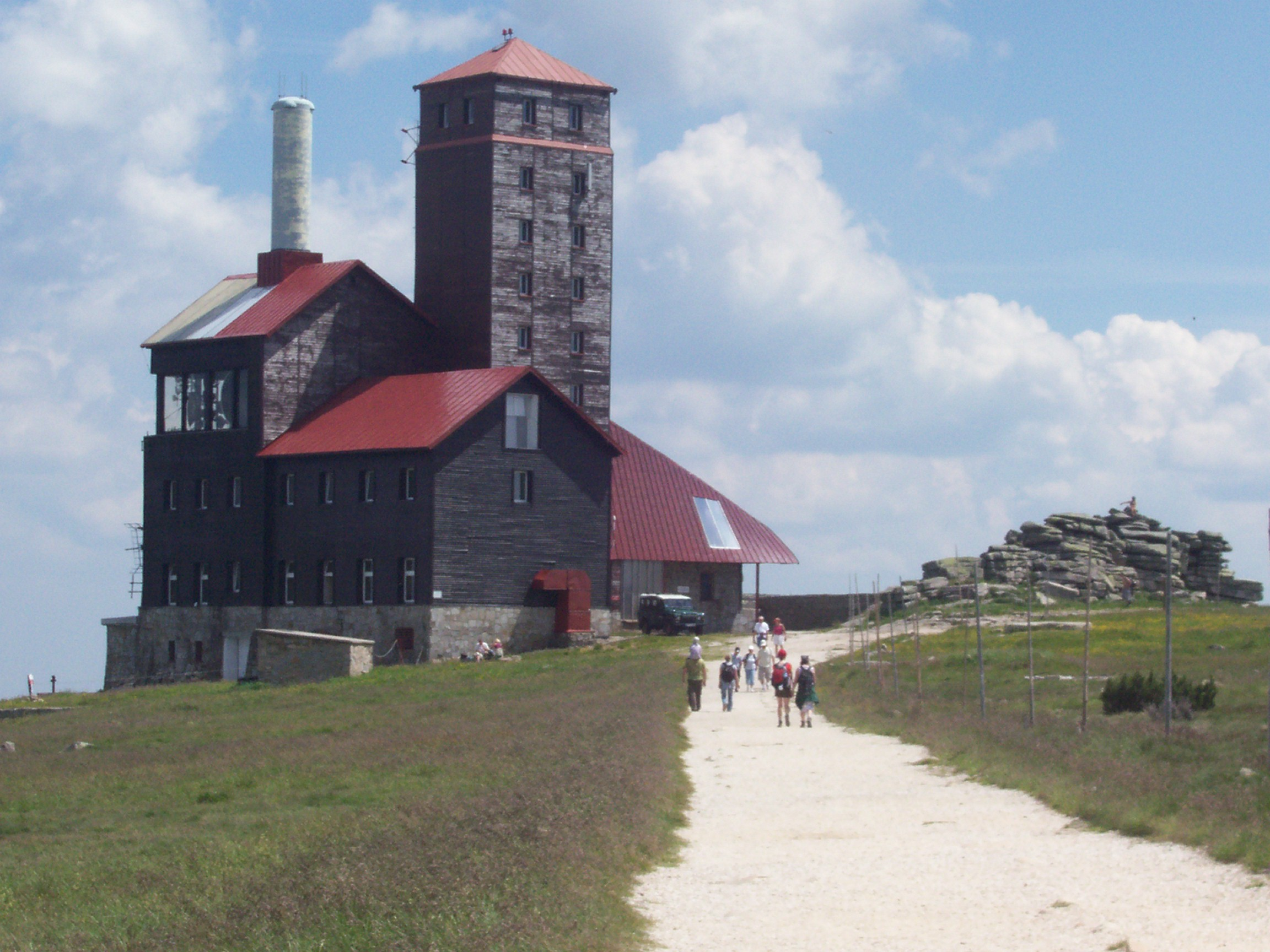 Stacja radioprzekaźnikowa na śnieżnych kotłach (Karkonosze, Polska)